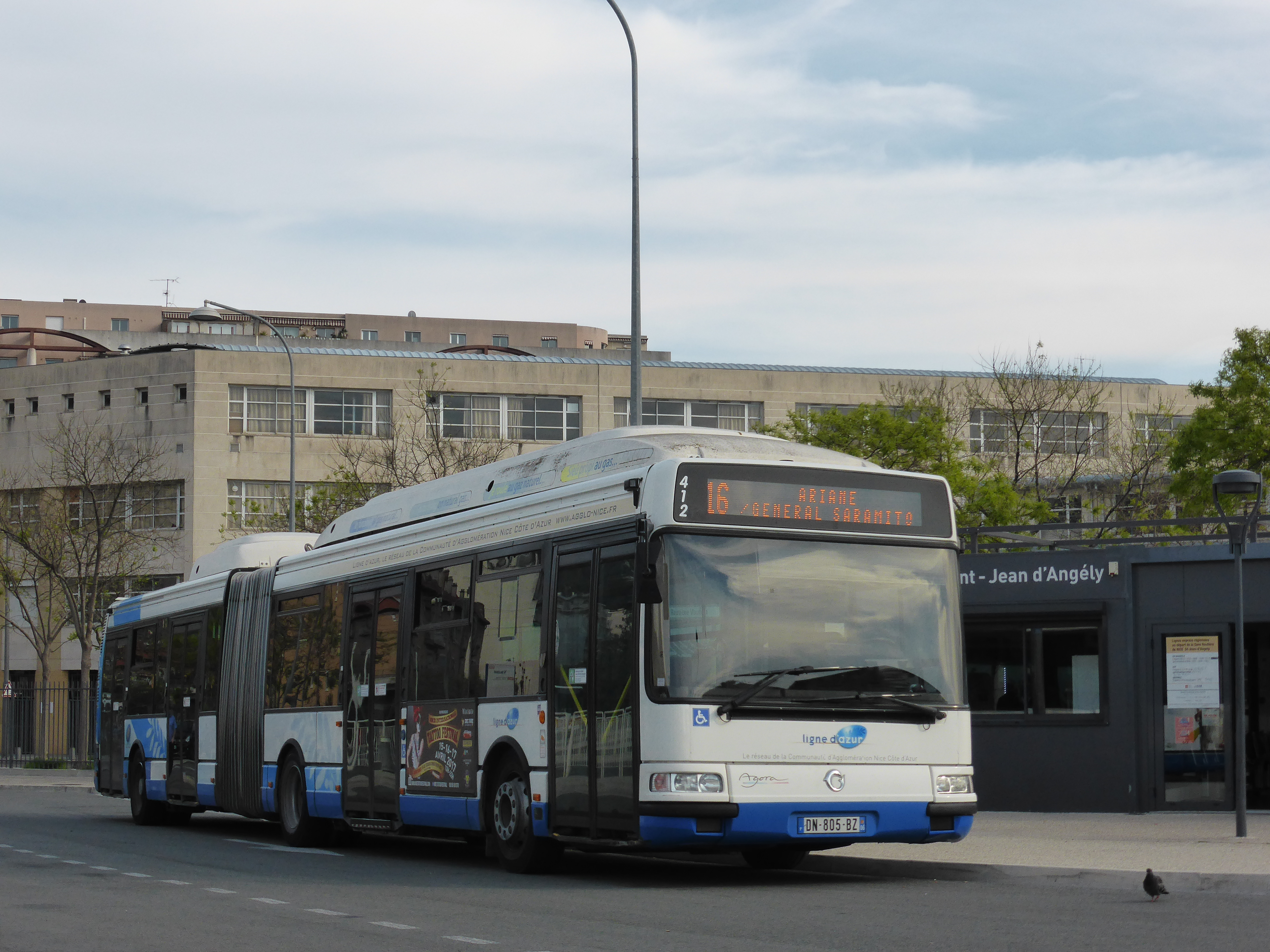 Un Irisbus Agora L GNV de la Ligne d'Azur à la gare routière de Nice Vauban